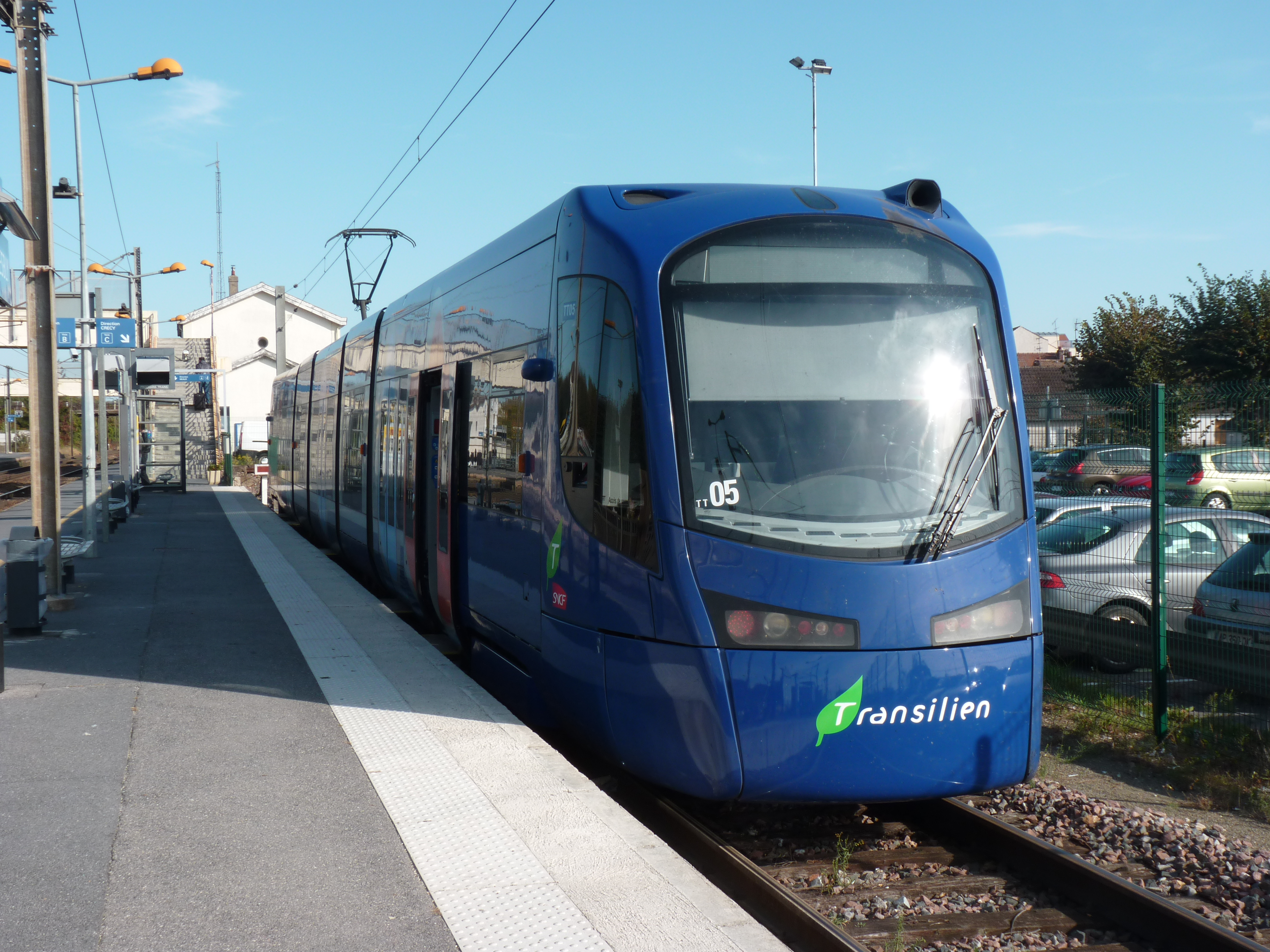 Le tram-train U 25509-10 en gare d'Esbly.